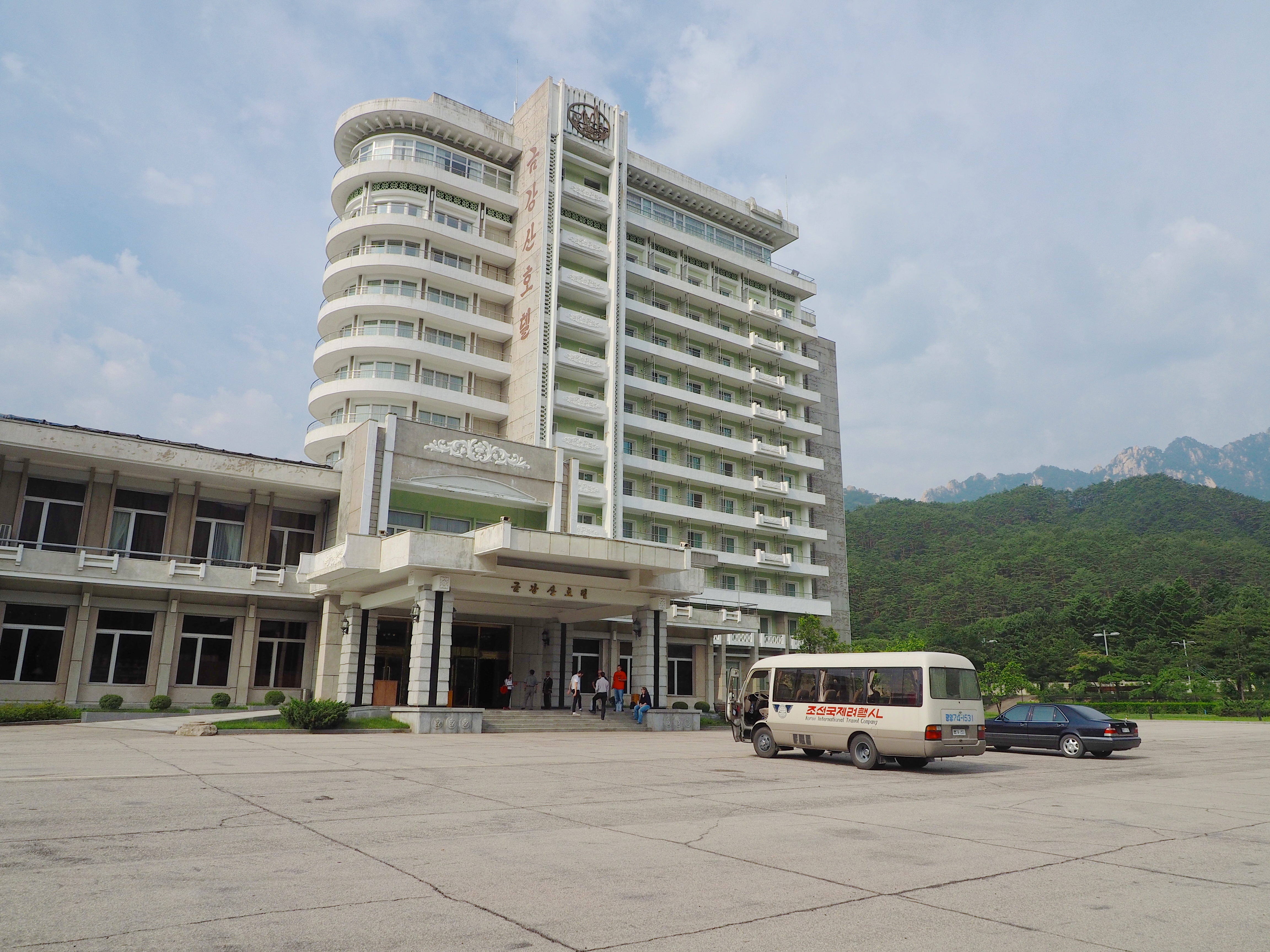 Kumgangsan Hotel at Mt Kumgang